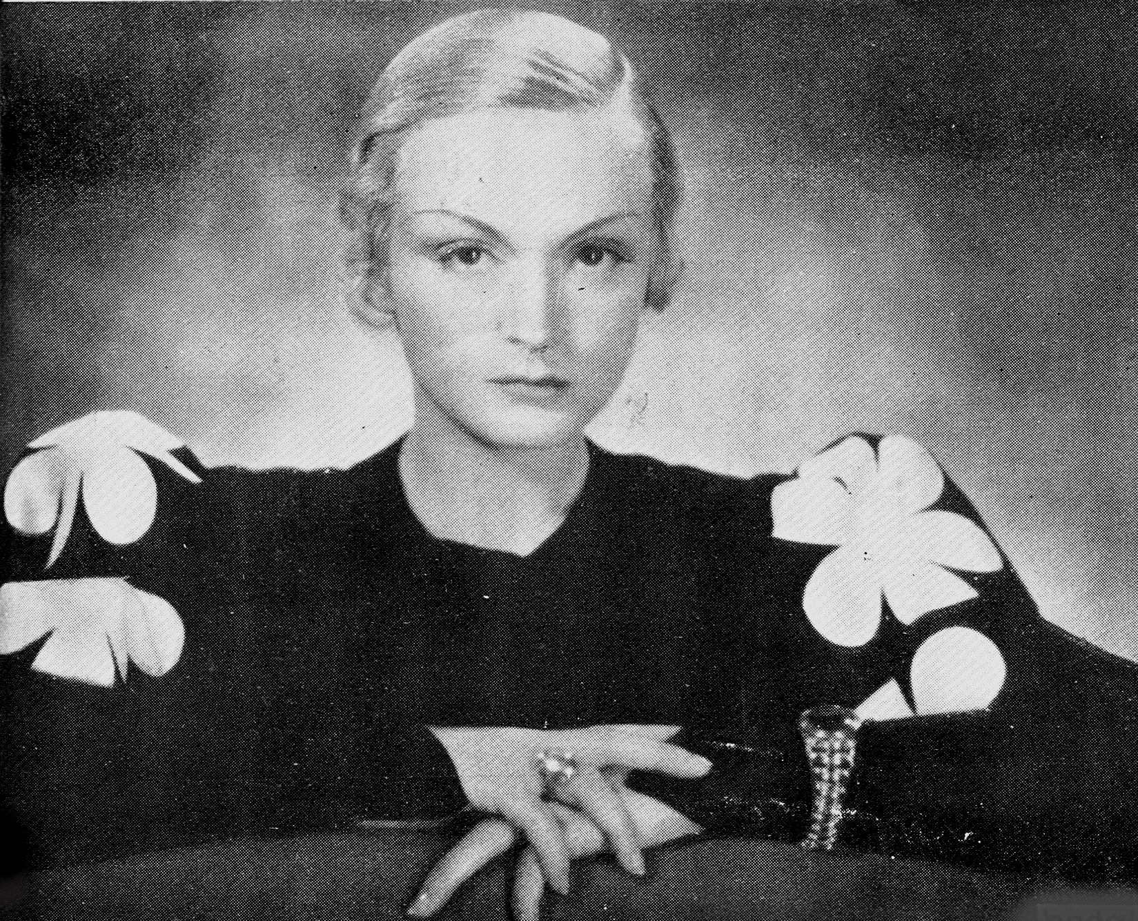 L'attrice Camilla Horn in un'immagine pubblicata in Italia - agosto 1936